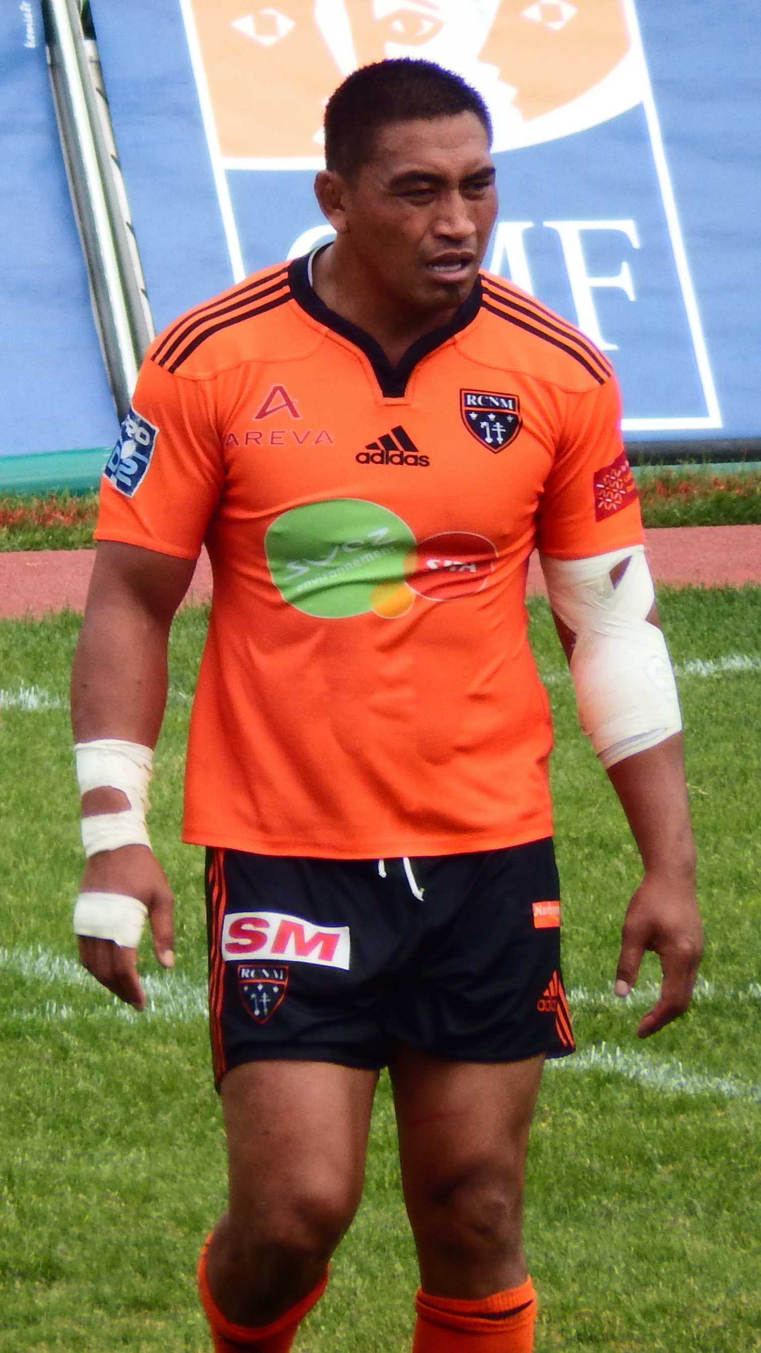 Pro D2 2014-2015 — 3 May 2015, Parc des sports et de l'amitié. Match between: RC Narbonne Méditerranée — US Dax